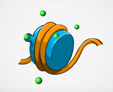 Epigenome picture